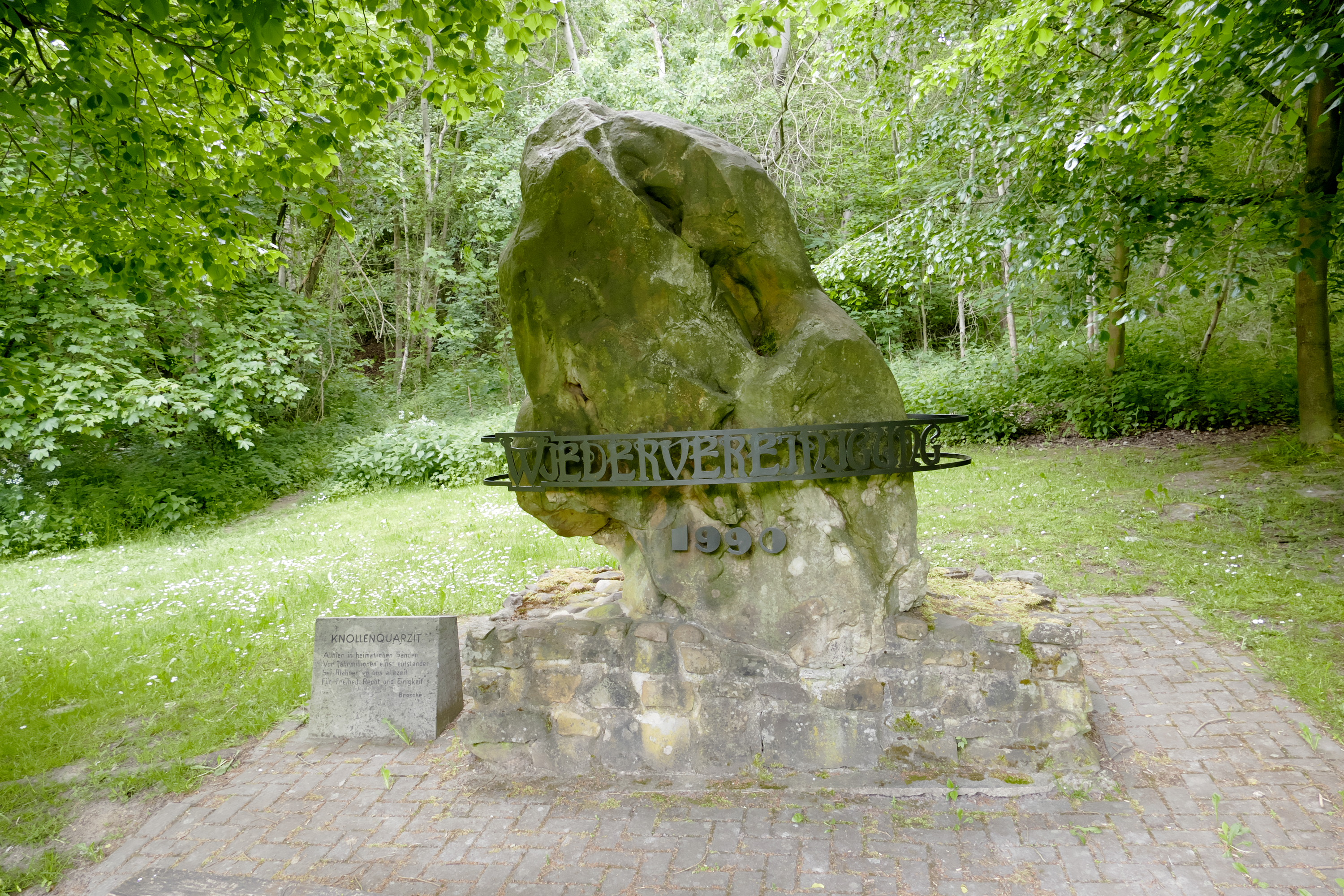 Idee und Initiative: Dr. Günter Szibor, Beendorf K.H. Friedrichs, Bürgermeister Beendorf Dr. K. Brosche, Helmstedt Dieser Stein wurde im Auftrag der Gemeinde Beendorf mit Unterstützung der Stadt Helmstedt errichtet. 9.11.1993